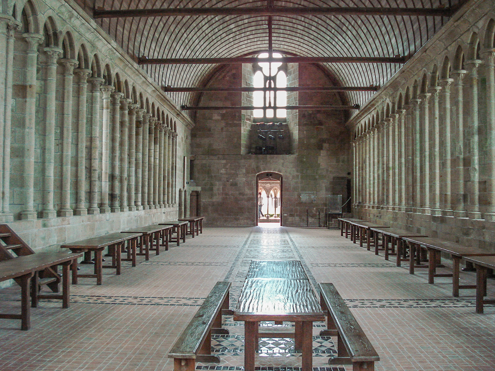 Réfectoire de l'abbaye du Mont-Saint-Michel (vue vers le cloître).